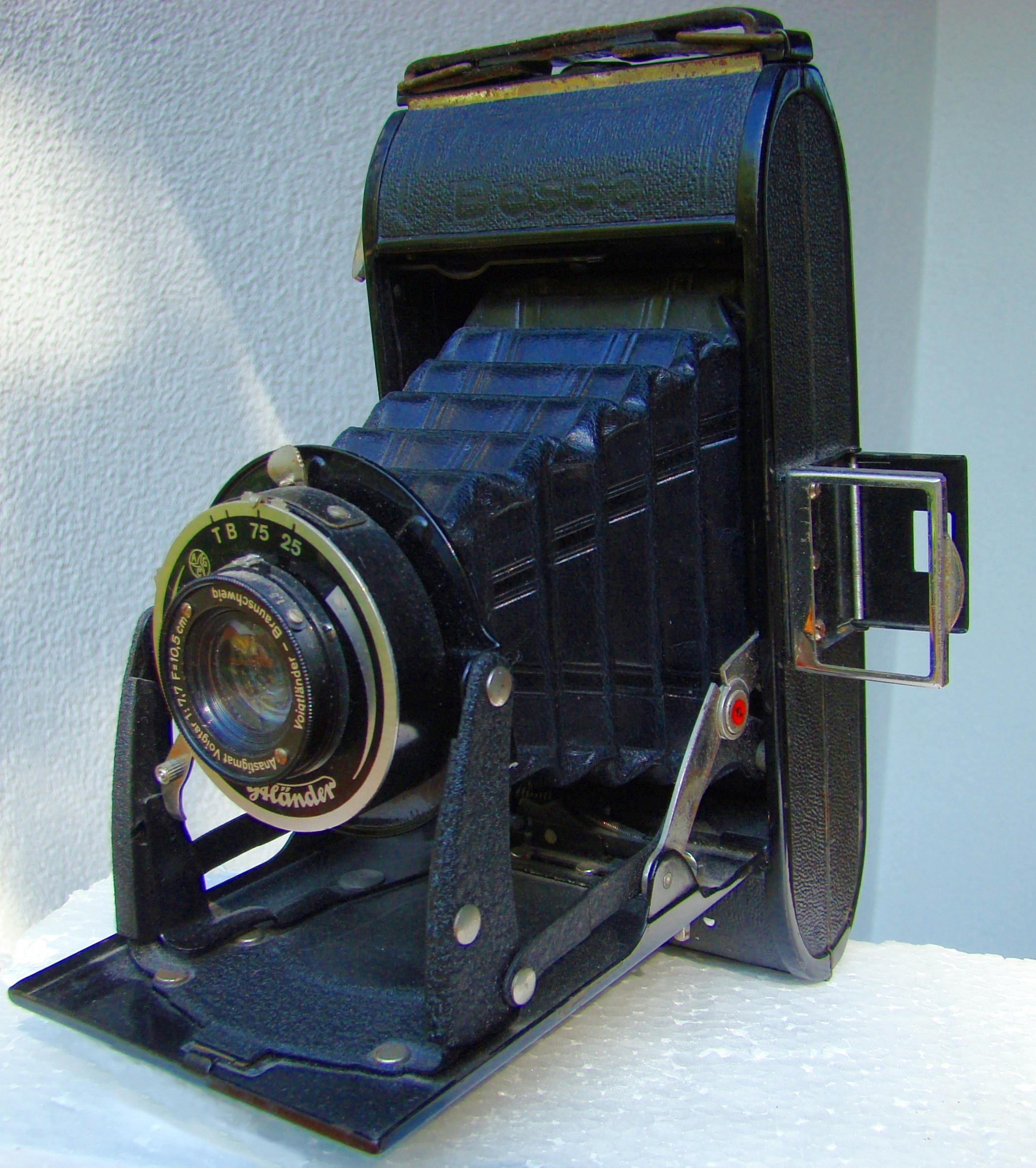 Voigtländer-Kamera „Bessa“, Baujahr 1935